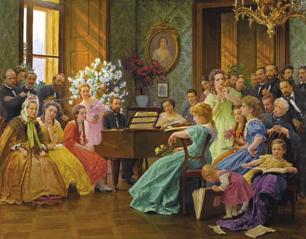 František Dvořák: Bedřich Smetana mezi svými přáteli roku 1865, olej na plátně, 125 x 161.3 cm, 1923, soukromá sbírka. Vyšlo jako reprodukce V Praze : Státní nakladatelství, 1924